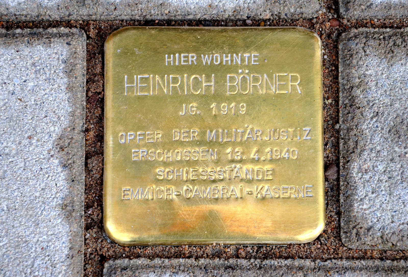 Zu Ehren des 1919 in Linden geborenen Melkers Heinrich Börner, der 1940 den Kriegsdienst für den Zweiten Weltkrieg verweigerte und deshalb von der nationalsozialistischen Militärjustiz am 13. April 1940 an einem Schießstand der Emmich-Cambrai-Kaserne bei Langenhagen erschossen wurde, verlegte der Künstler Gunter Demnig in Anwesenheit unter anderem von Mitgliedern vom Friedensbüro Hannover und von dem Abgeordneten aus dem Niedersächsischen Landtages, Michael Höntsch (SPD) ...